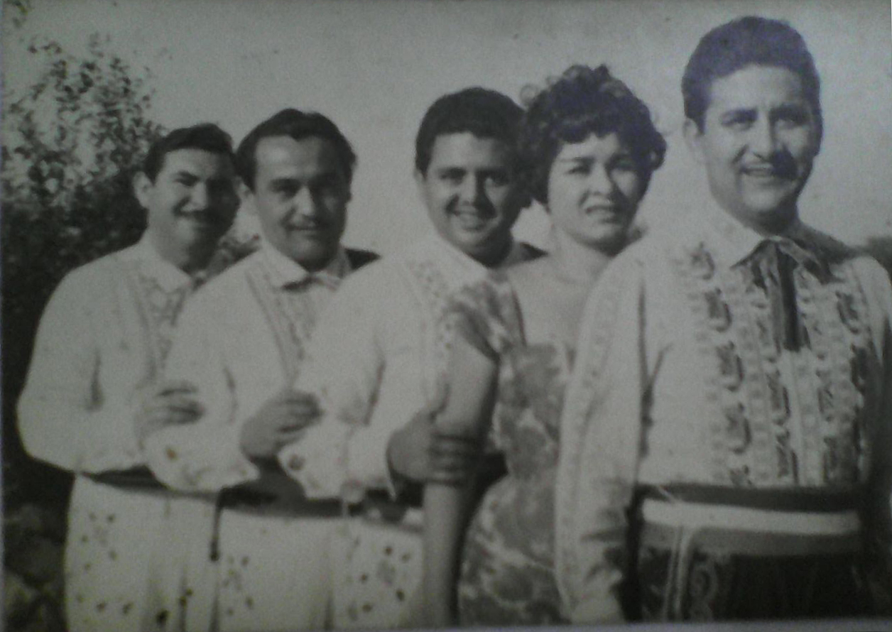 Conjunto musical Los Indios de 1960 en su gira euroasiática representando al Paraguay. De izquierda a derecha: Lorenzo Leguizamón (arpa), Carlitos Vera (requinto), Ulises Ayala (guitarra y voz), Chinita Montiel (voz) y Juan Alfonso (director, guitarra y voz). Archivo fotográfico del álbum personal del artista cuya familia me ha permitido digitalizar sus documentos.